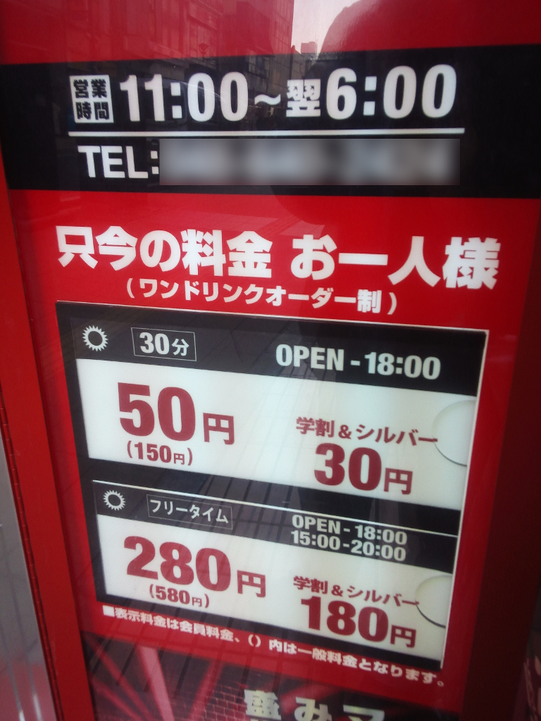 通常のカラオケボックスにおける利用料金の一例（2013年撮影）。「一人あたりの利用時間」に応じて加算されるシステムになっている。